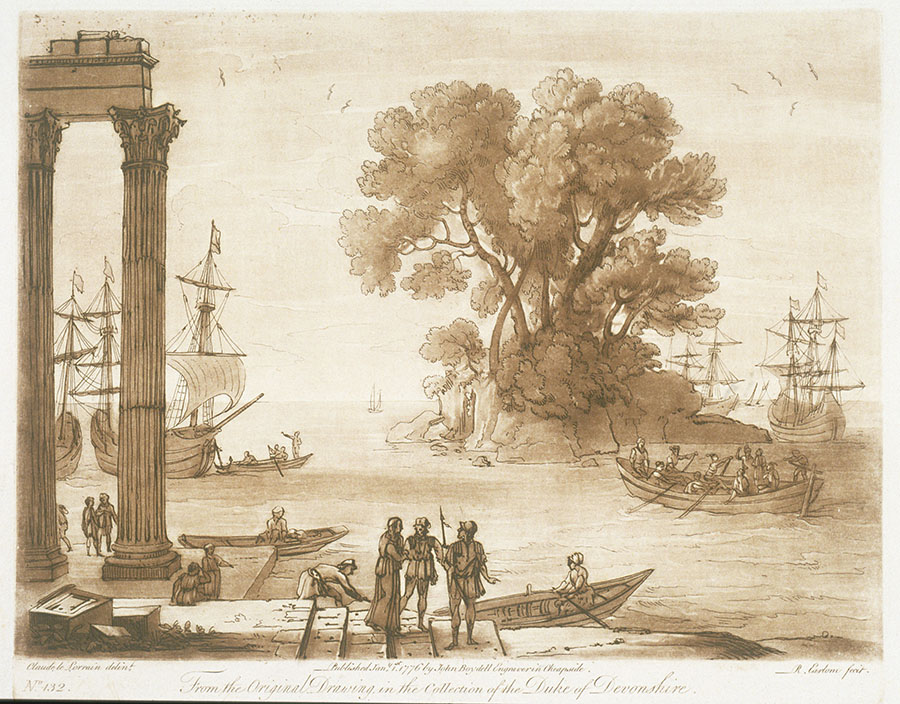 Marina con el embarque de San Pablo, dibujo 132 del Liber Veritatis de Claude Lorrain.